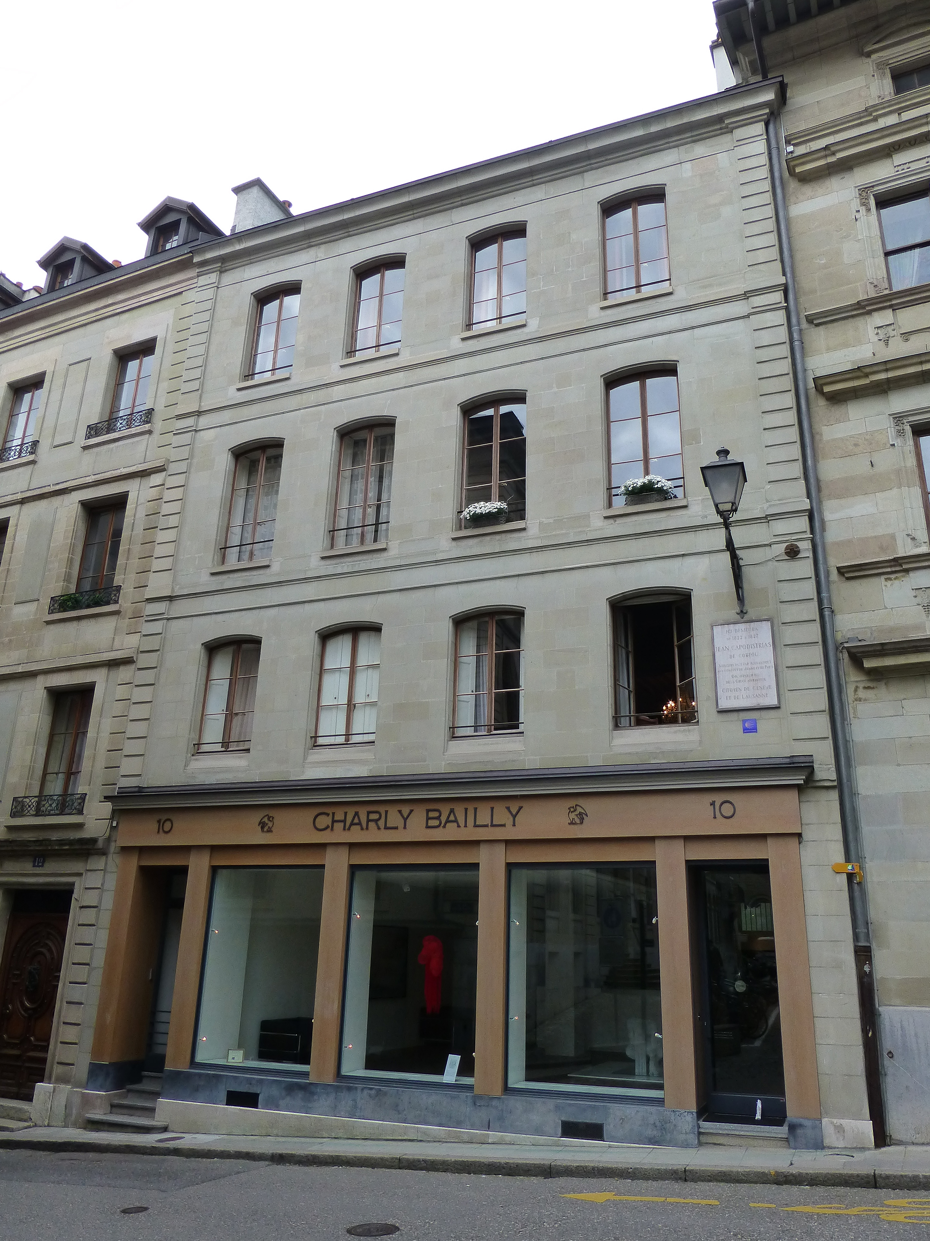 Genève (Suisse), 10, rue de l'Hôtel de Ville, avec plaque : "Ici demeura de 1822 1827 Jean Capodistrias de Corfou, ministre du czar Alexandre I aux Congrès de Vienne et de Paris, gouverneur élu de la Grèce affranchie, citoyen de Genève et de Lausanne"